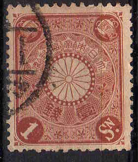 japanese stamp（日本の普通切手）菊切手と呼ばれる明治時代の普通切手である。